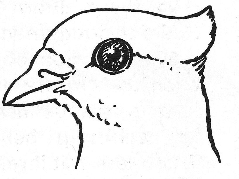 Federbildung am Kopf von Haustauben: Spitzhaube (BUNGARTZ, 1922)